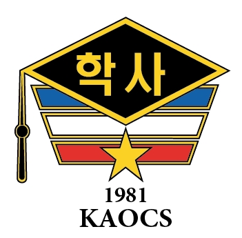 육군학사장교 공식마크